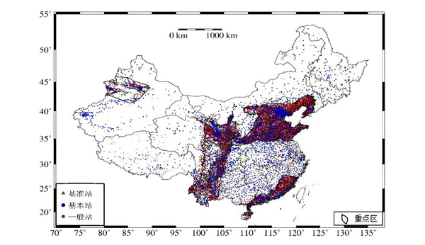 中文（中国大陆）: 国家地震烈度速报与预警工程计划部署的15510个监测站的分布图，包括基准站、基本站和一般站。